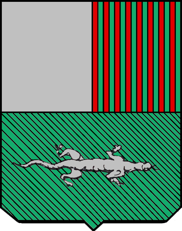 riproduzione